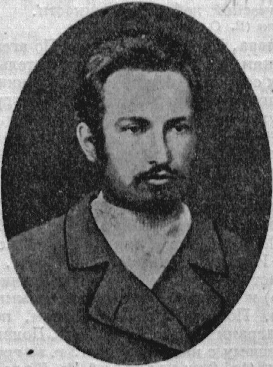 Осташкин Виктор Александрович - русский революционер, народник